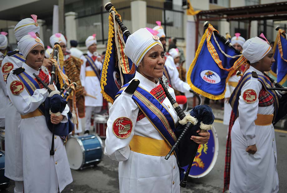 A performance band waiting for Prime Minister Datuk Seri Najib Tun Razak during Vaisakhi Day Celebration at Gurdwara Sahib in Kuala Lumpur April 14 2013. THE MALAY MAIL/ Firdaus Latif